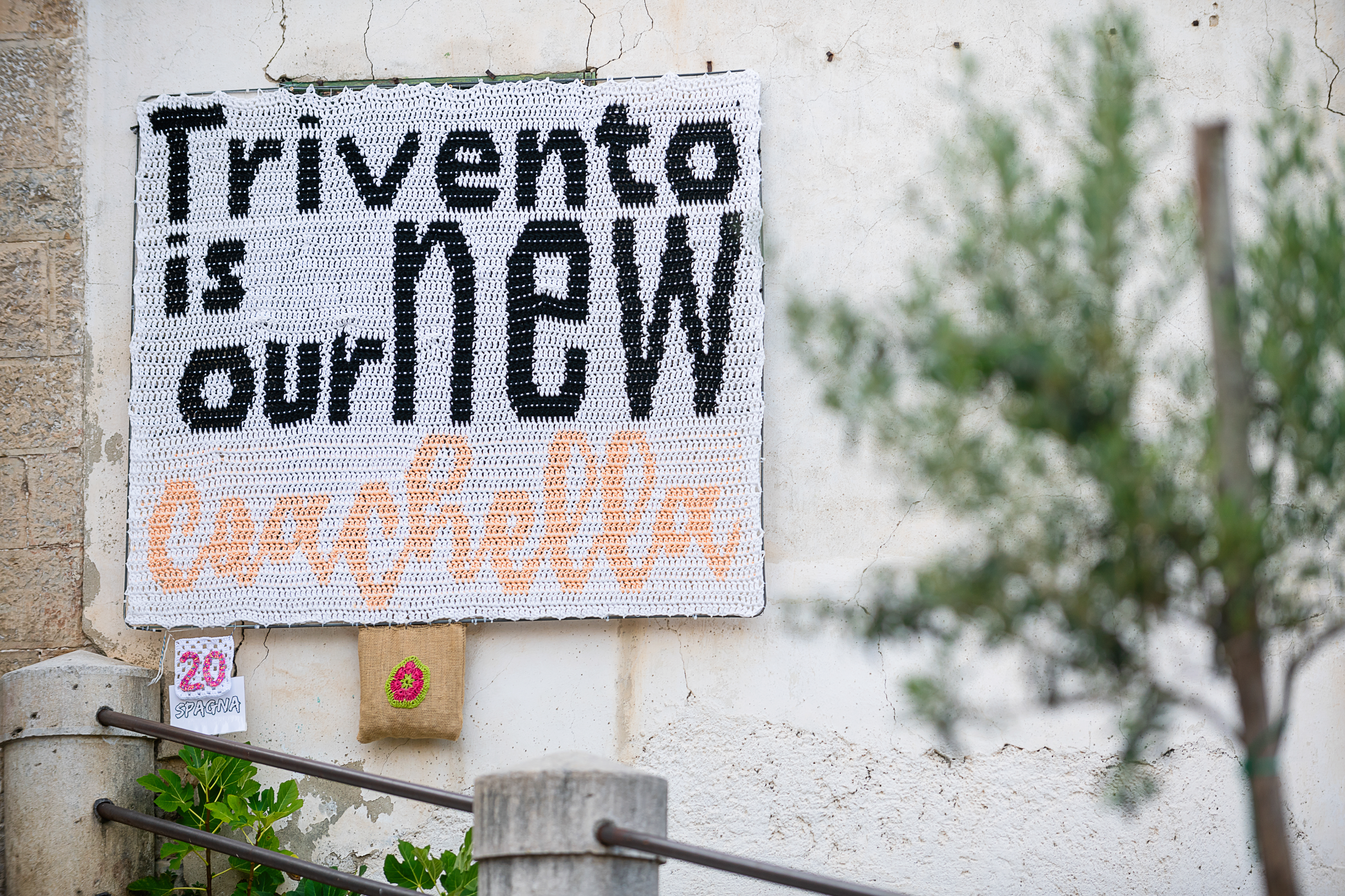 Trivento, 9 e 10 Agoto Ph. Paolo Scarano